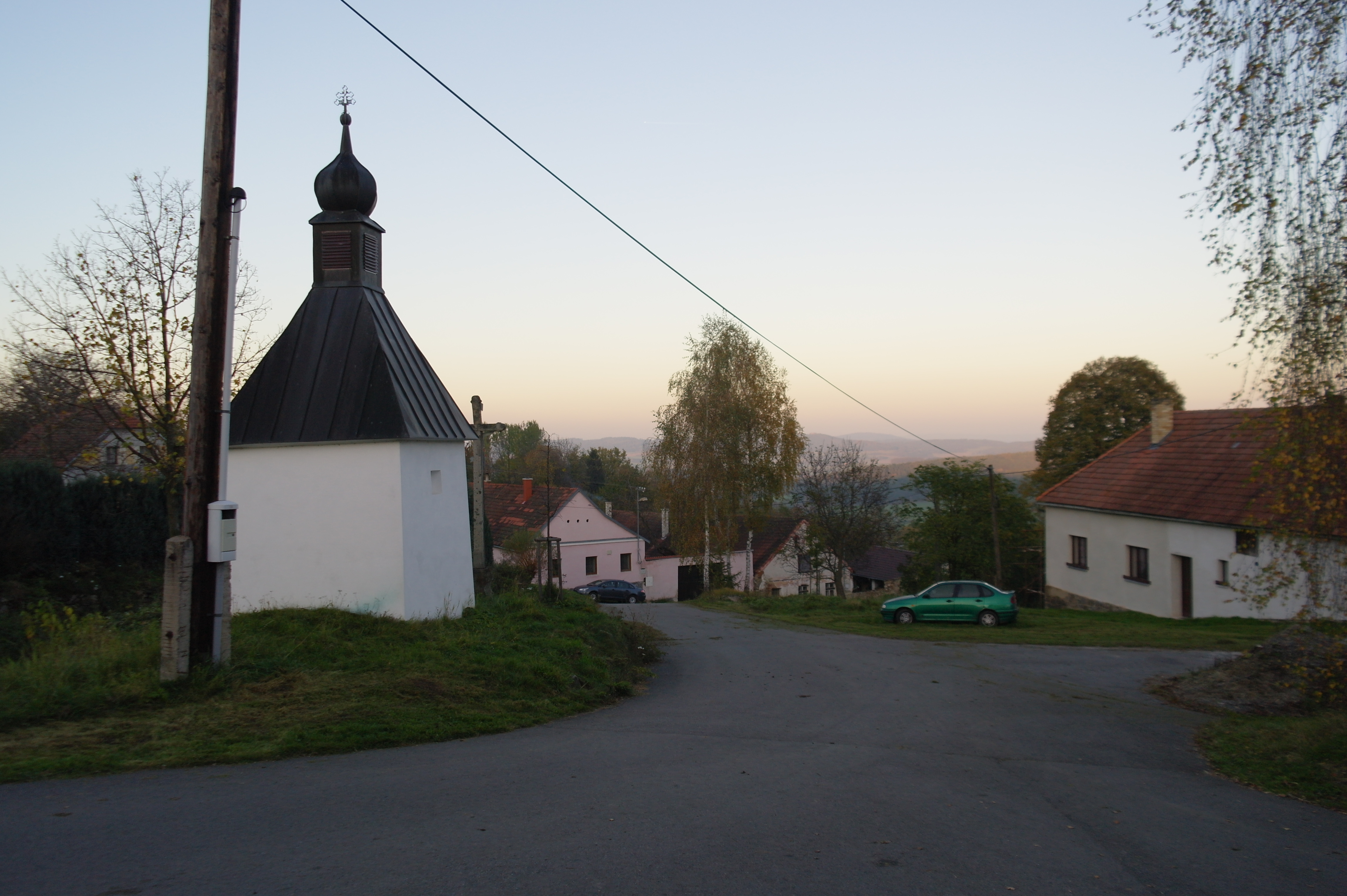 Kaple Panny Marie v Horních Nakvasovicích, od jihu.